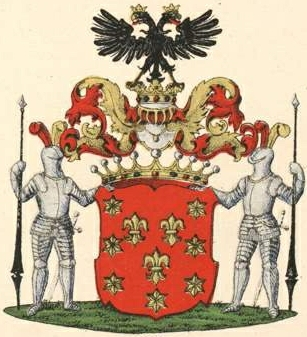 Lieveni suguvõsa krahvivapp (Püha Rooma)